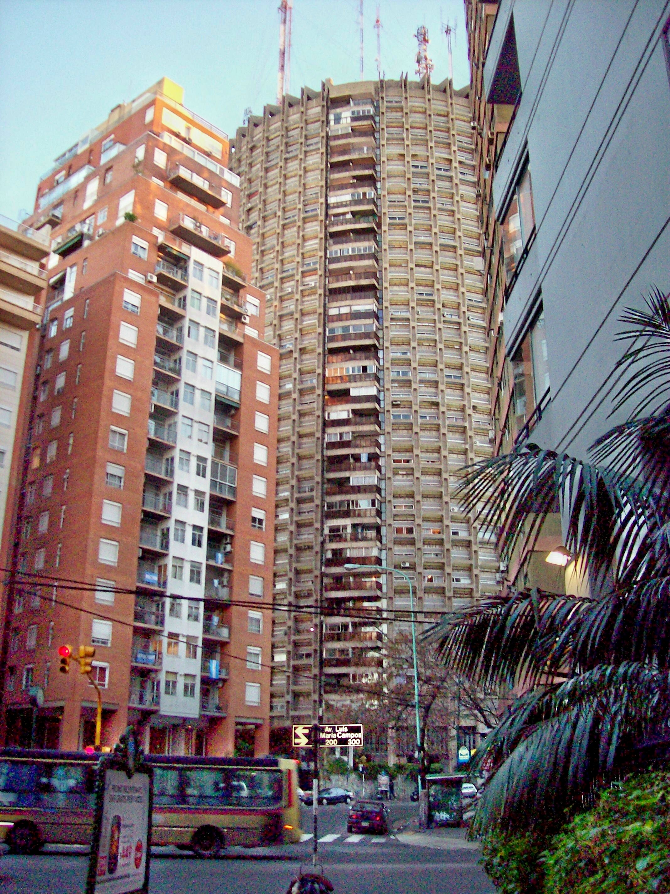 Torre Dorrego (Caffarini, Joselevich & Ricur, 1968-71), en Dorrego 2699, Buenos Aires, Argentina.